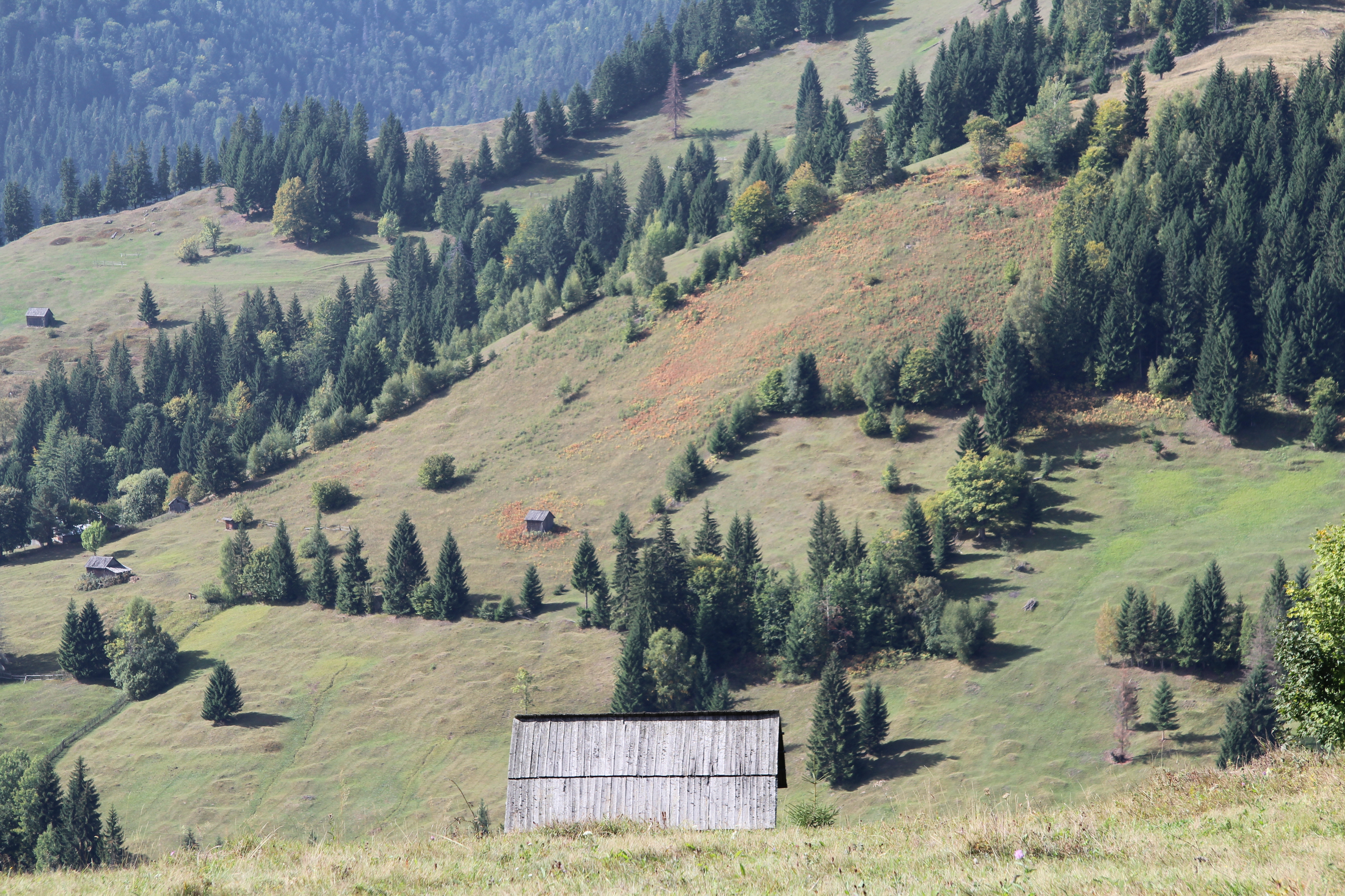 Karpatenlandschaft bei Slatioara (Nähe Campulung Moldovenesc), Kreis Suceava, Rumänien